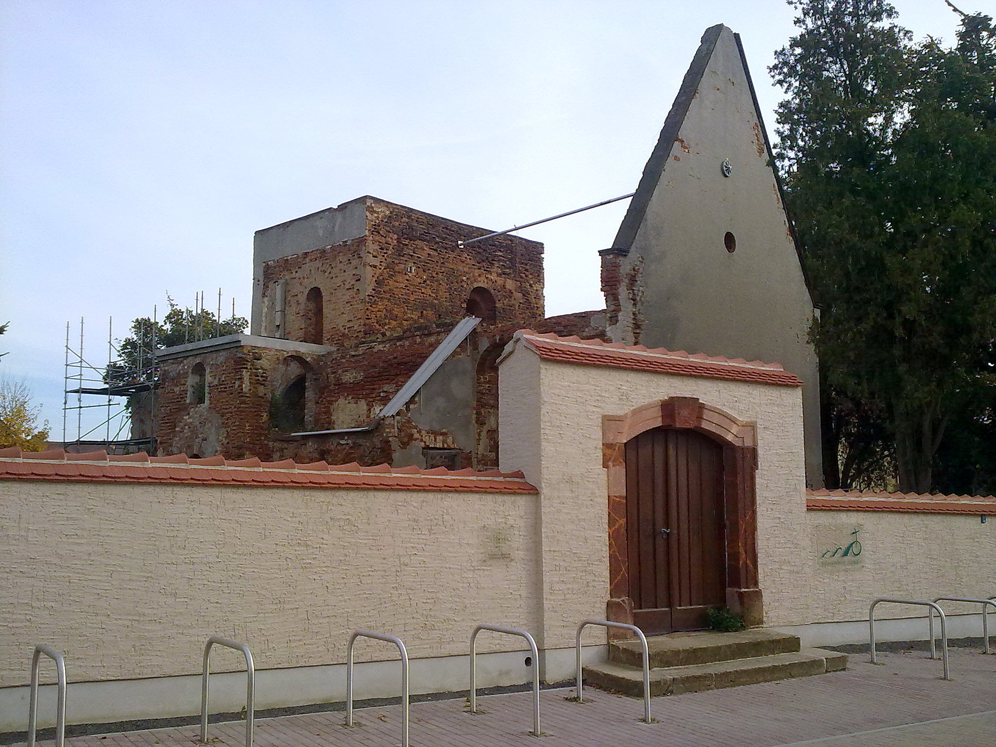 Zöbigker Kirchruine und zukünftige Fahrradkirche